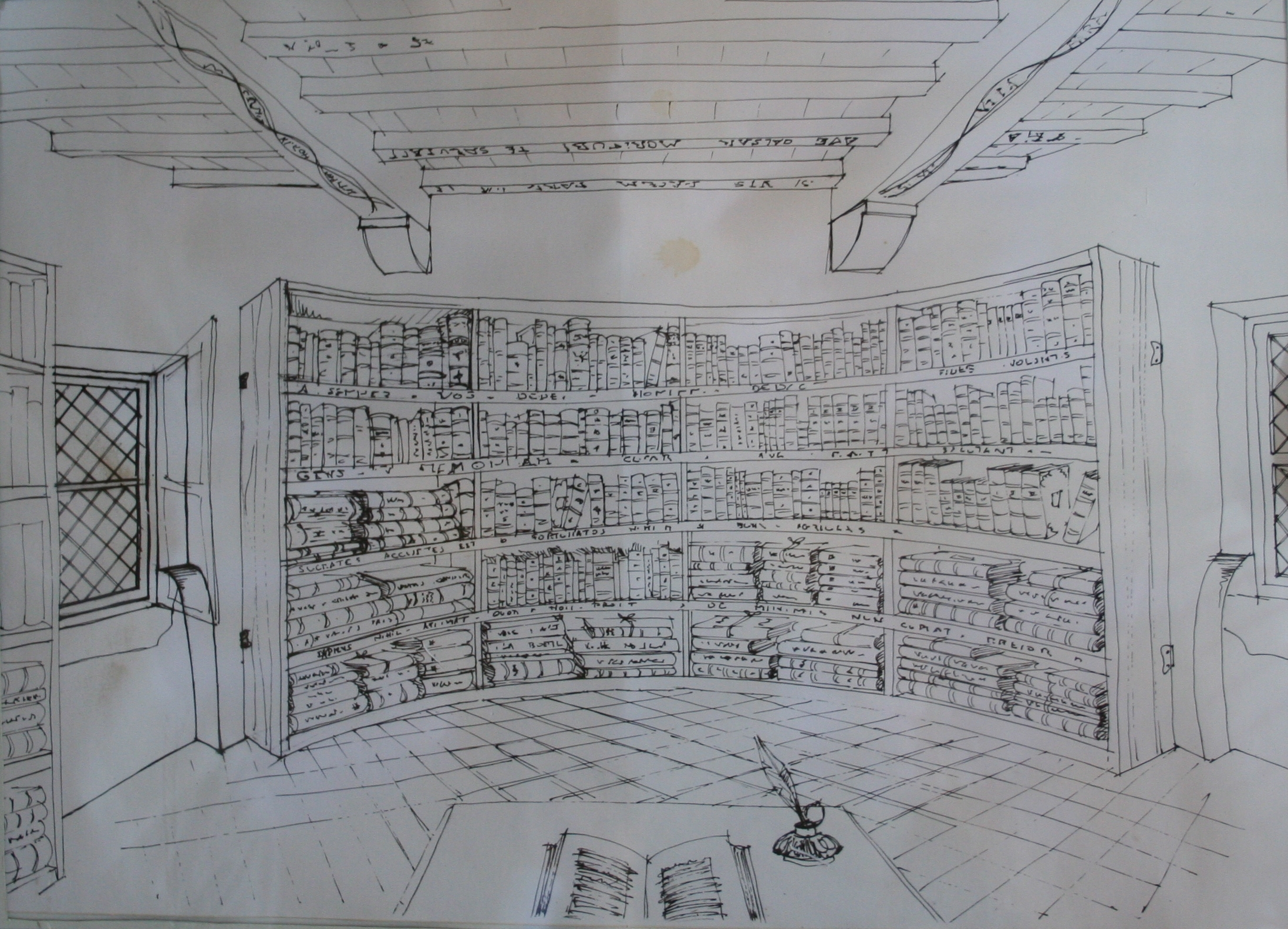 Reconstitution de la bibliothèque de Montaigne au château de Montaigne.